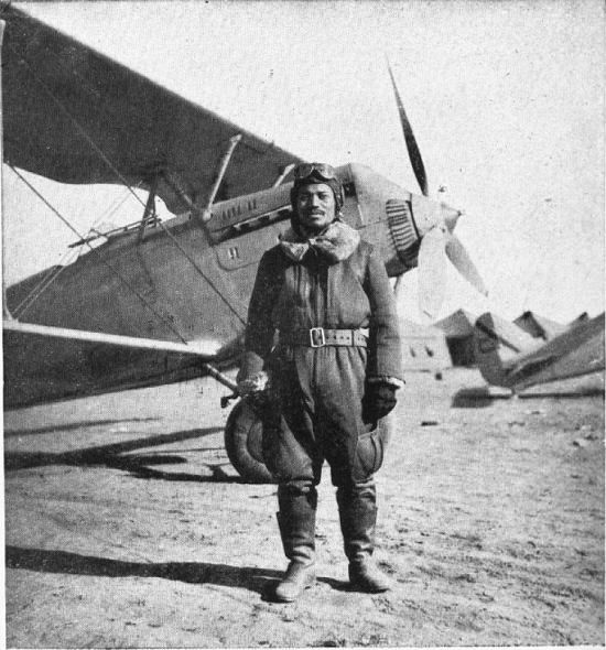 中国石家荘、95式戦の前で。